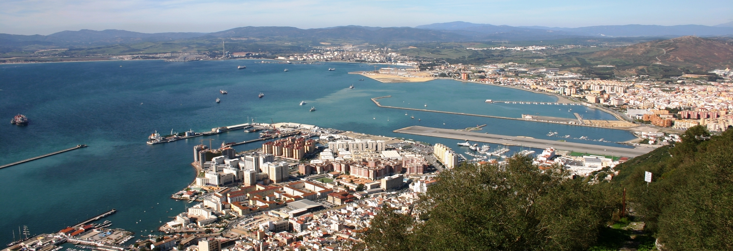 Hafe vu Gibraltar Quell: eege Photo les Meloures